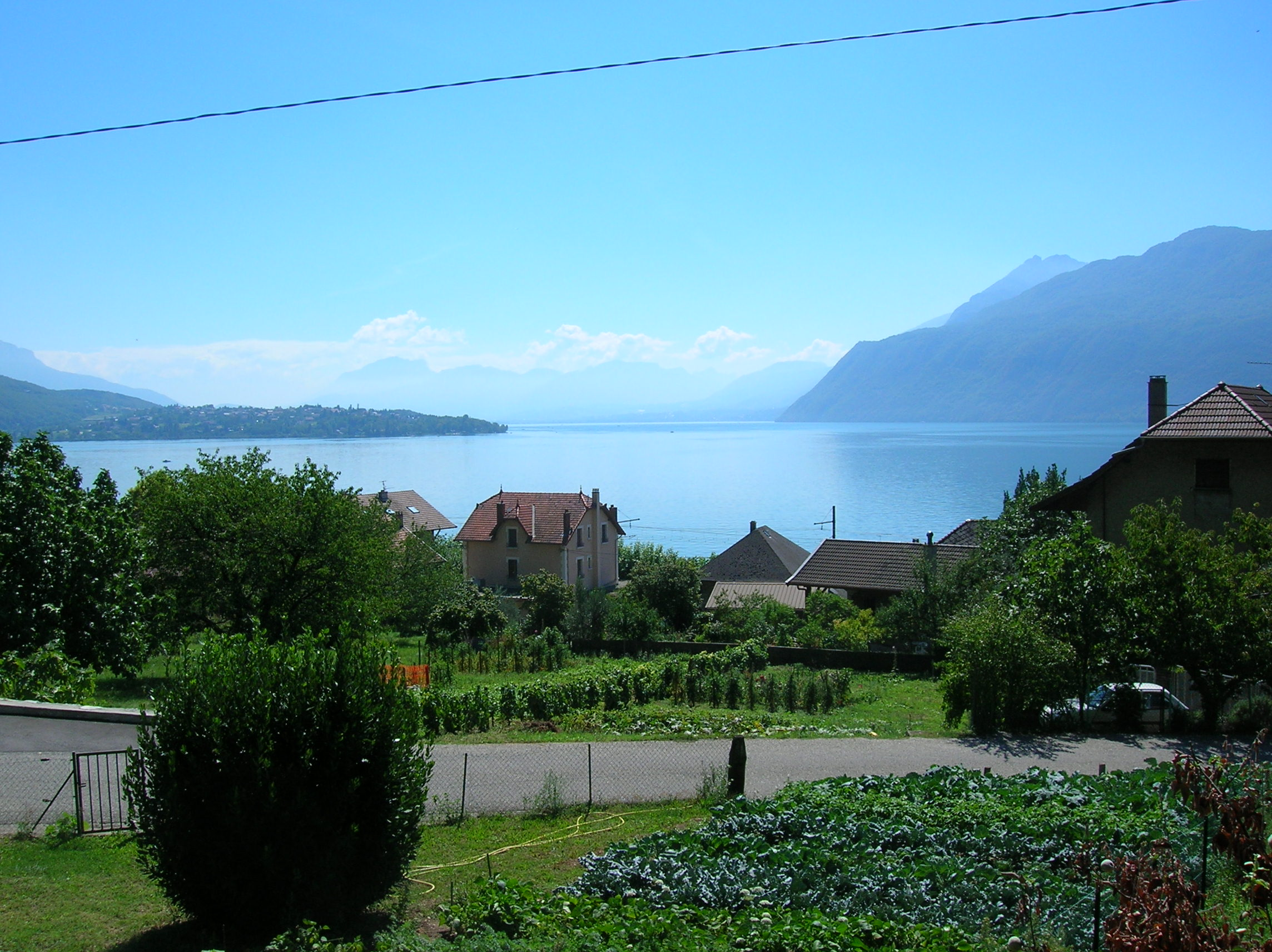 Lake of Bourget - Savoy - Alps - France : Lac du Bourget - Savoie - Alpes - France